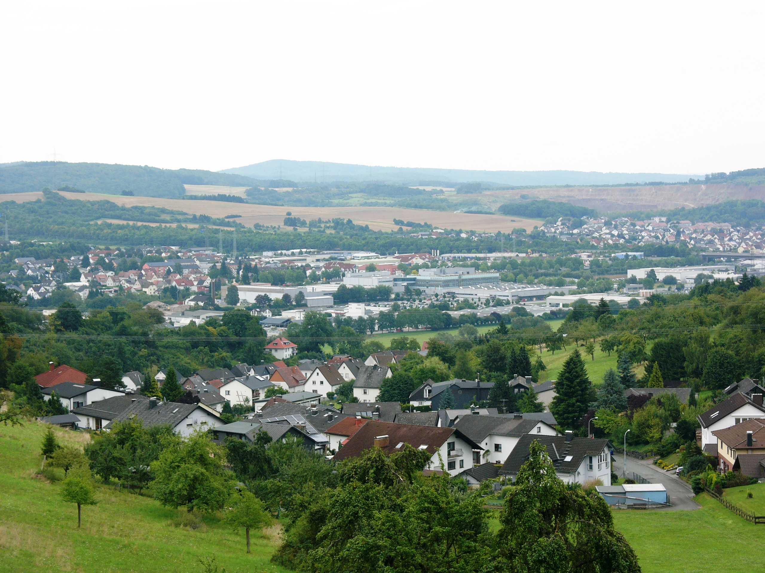 Blick oberhalb von Klein-Altenstädten über die Aßlarer Kernstadt